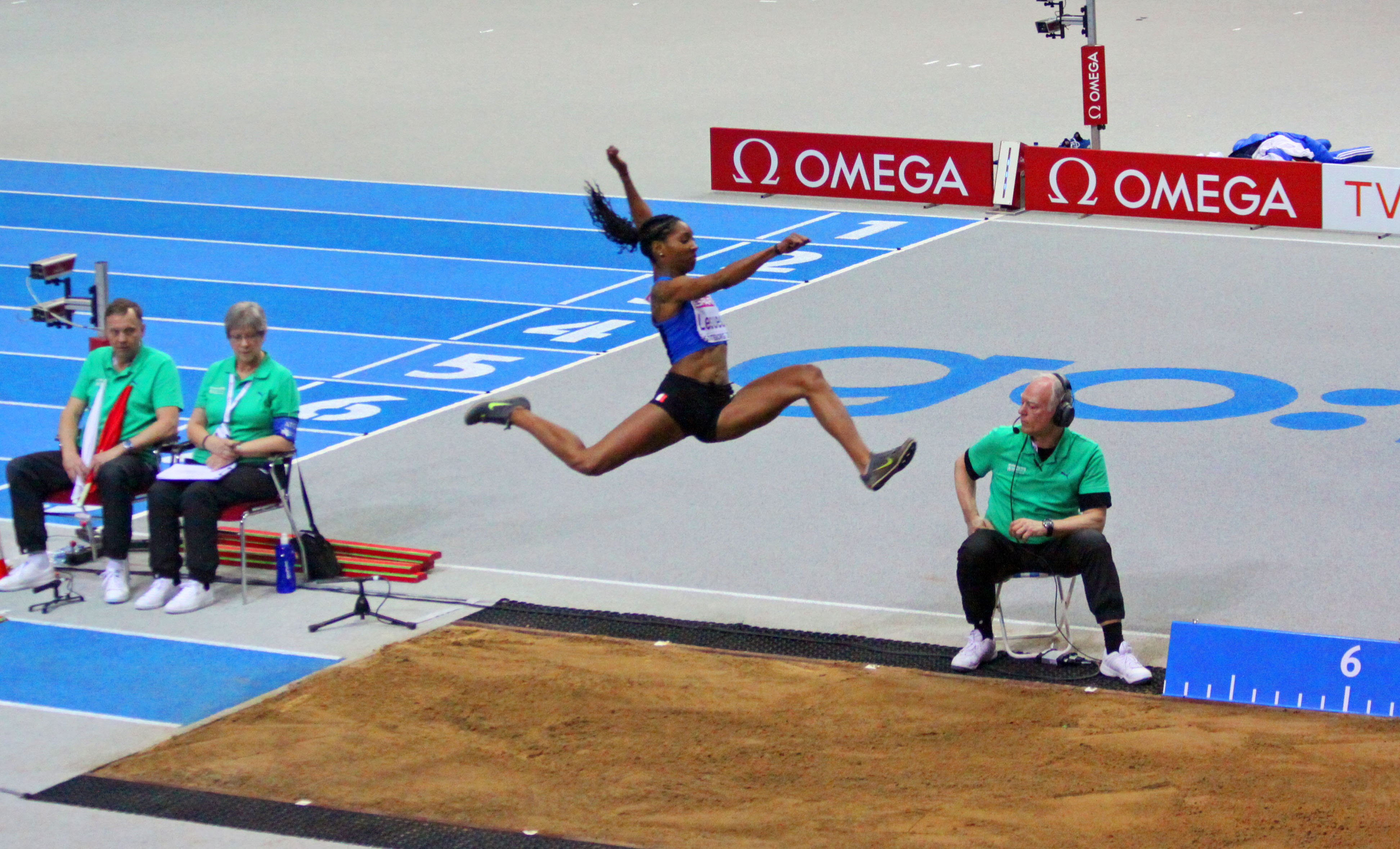 Göteborg. Eloyse Lesueur aux championnats d'Europe en salle 2013.